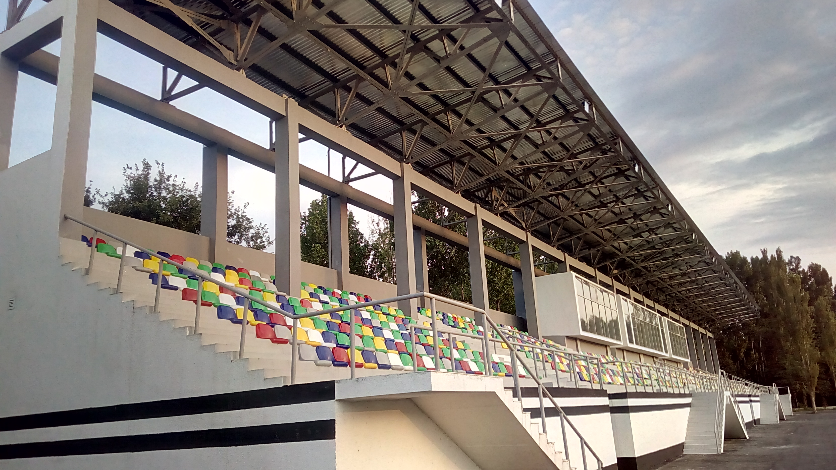 Ağcabədi OİK